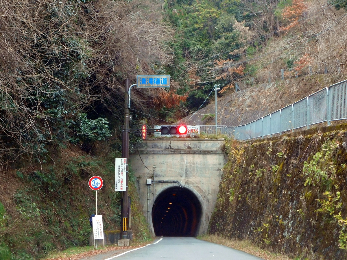 京都市愛宕山登山時に通る清滝トンネル。戦前は愛宕山鉄道のトンネルであったが、現在は交互通行の自動車用トンネルとなっている。